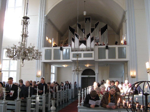 Sulkavan kirkko, sisäkuva urkuparvelle päin.